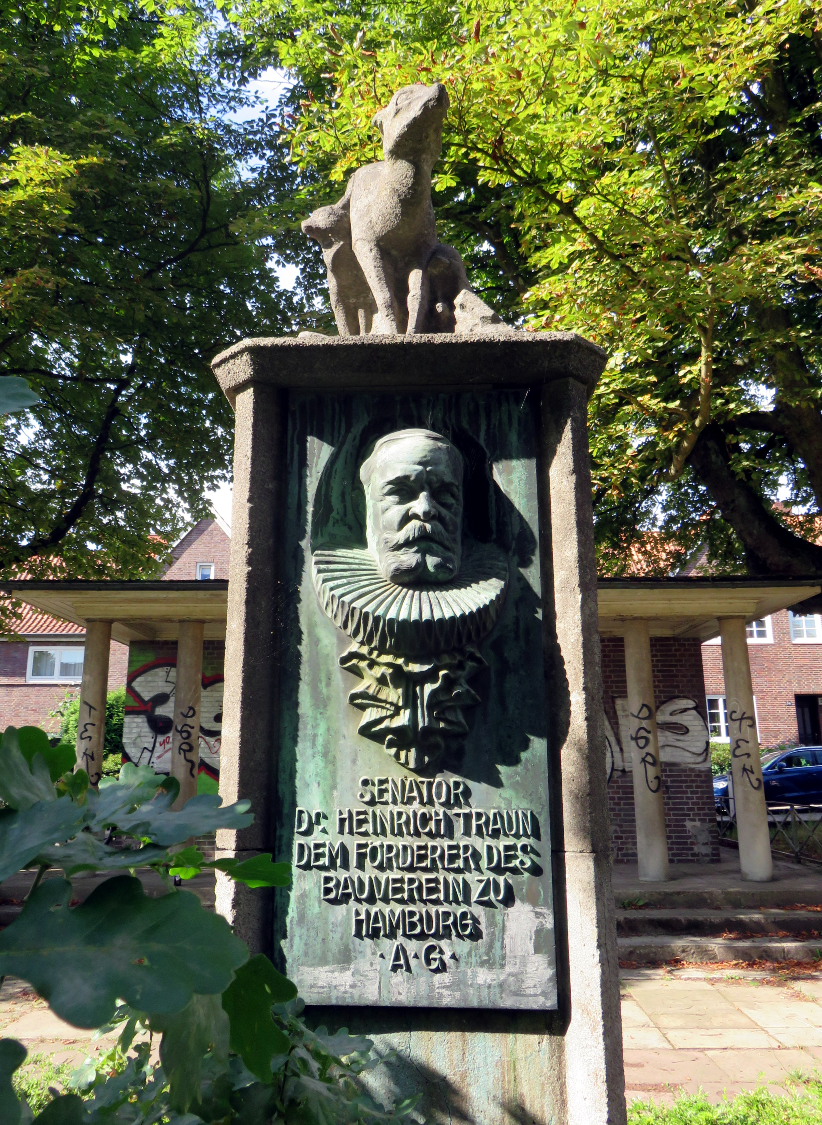 Der Heinrich-Traun-Platz im Hamburger Stadtteil Fuhlsbüttel, umbaut etwa 1930, geht vom unteren Teil der Heinrich-Traun-Straße ab. Beide erinnern an den Hamburger Senator, Fabrikanten und Förderer des Bauvereins Heinrich Traun. Im oberen Bereich des Platzes befindet sich dessen Büste auf einer Sandsteinstele, verziert mit einer Reh-Kitz-Skulptur.